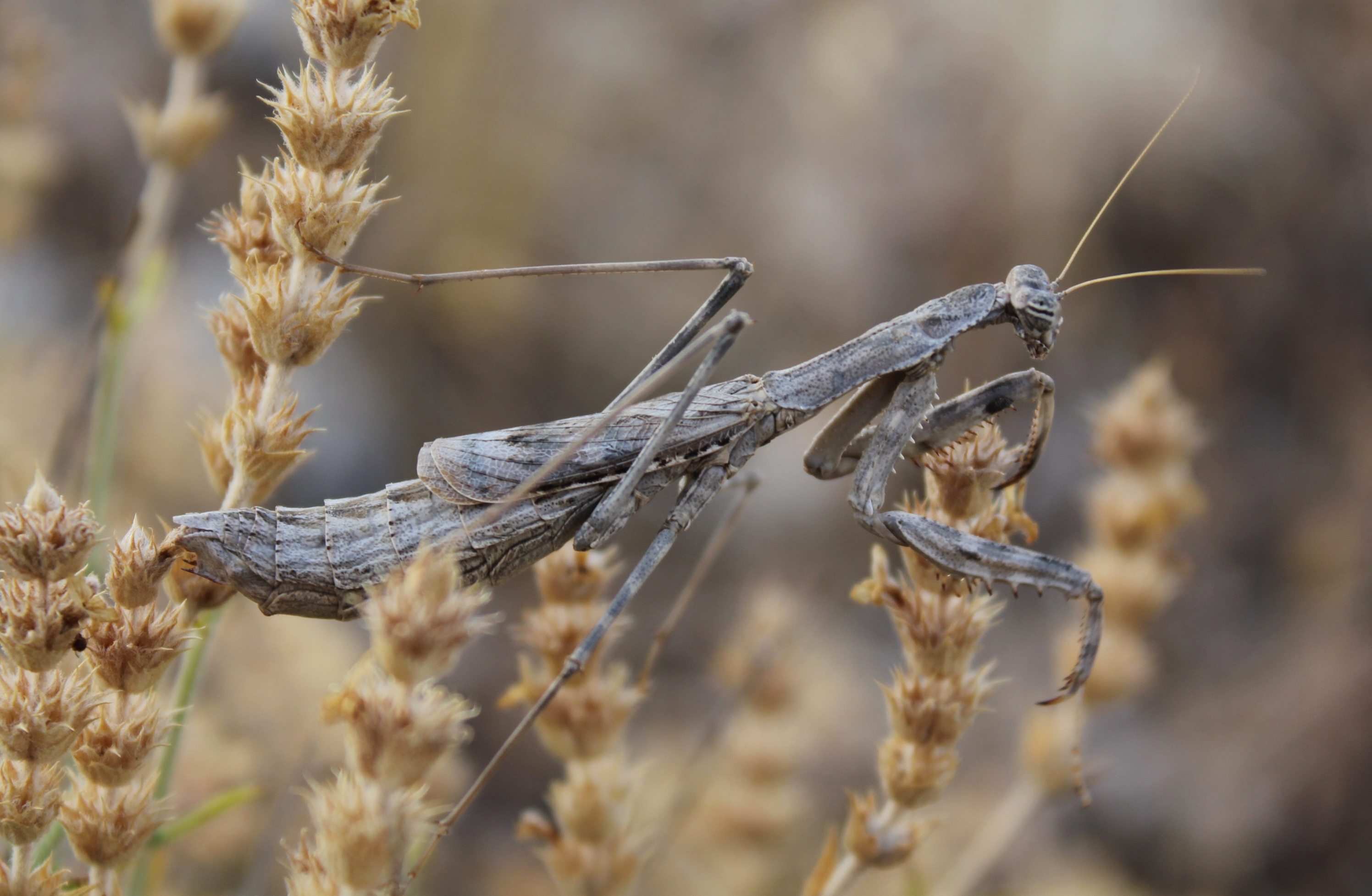 Hembra adulta de la mantis Rivetina baetica sobre una Sideritis en la Sierra de Chinchilla, Albacete, España.